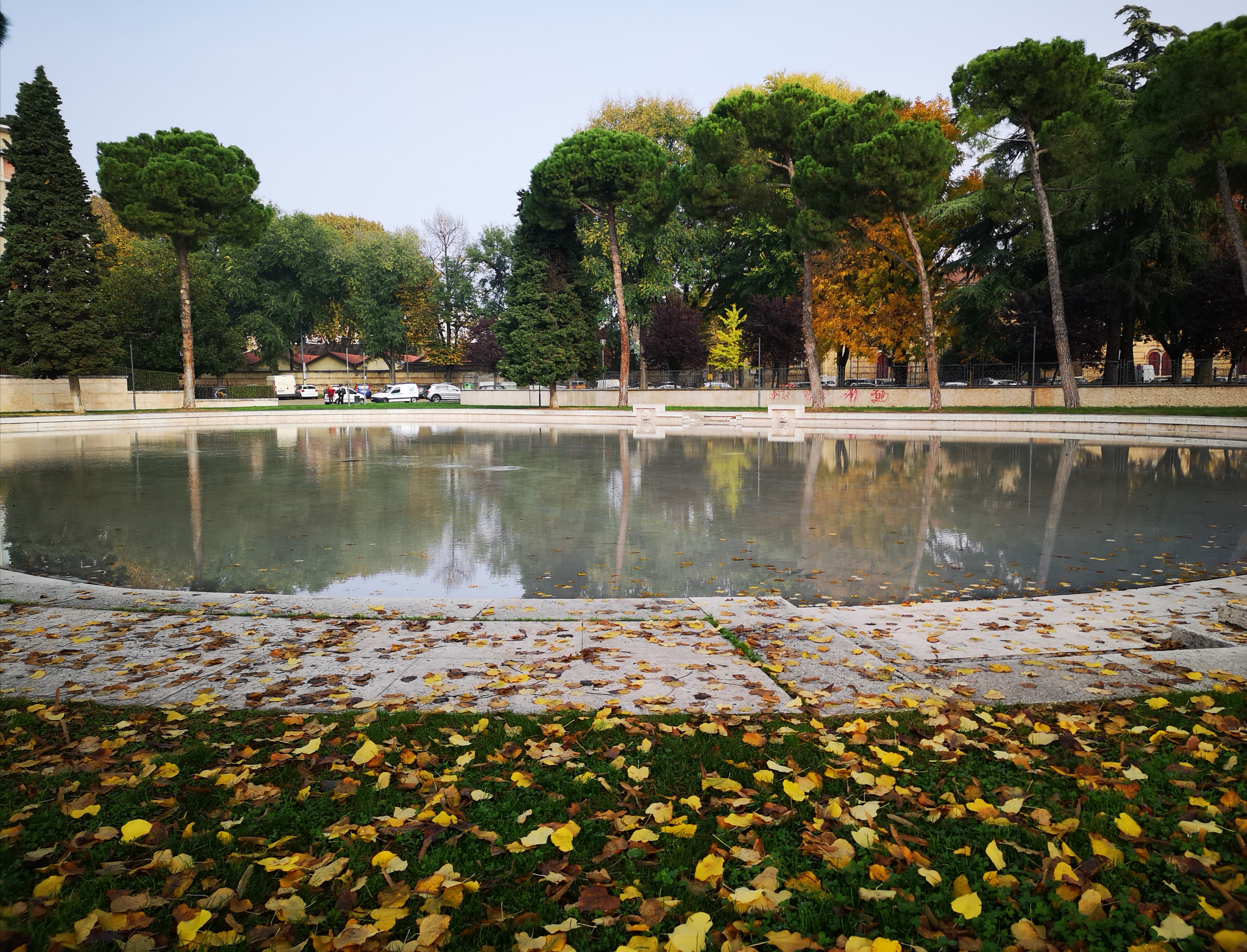 giardini pubblici comunali di Verona This is a photo of a monument which is part of cultural heritage of Italy.